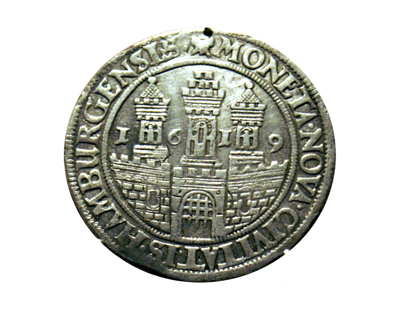 Hamburg, Reichstaler, 1619